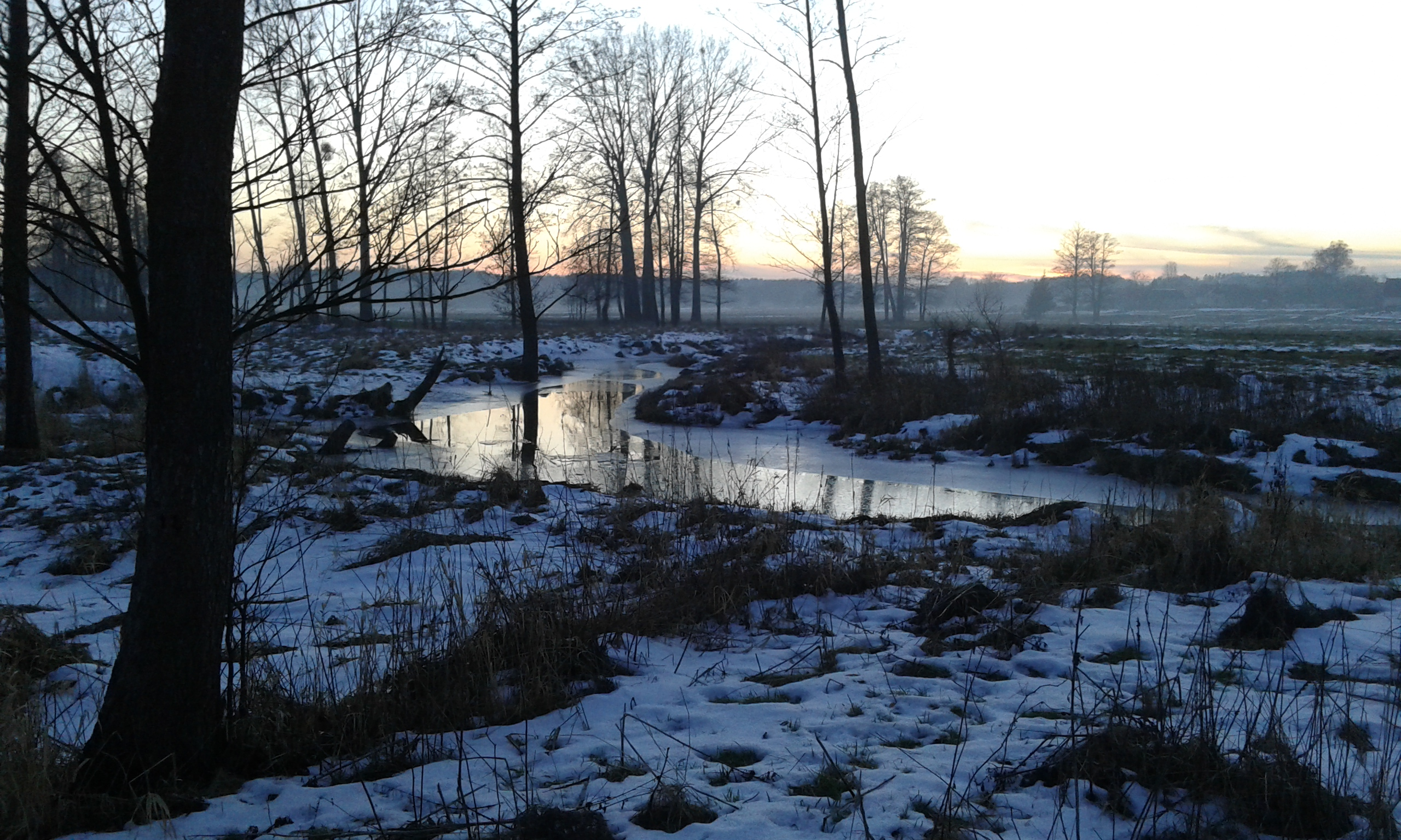 Беларуская (тарашкевіца): Мякішы (бельскі павет, Польшча): рэчка Локніца